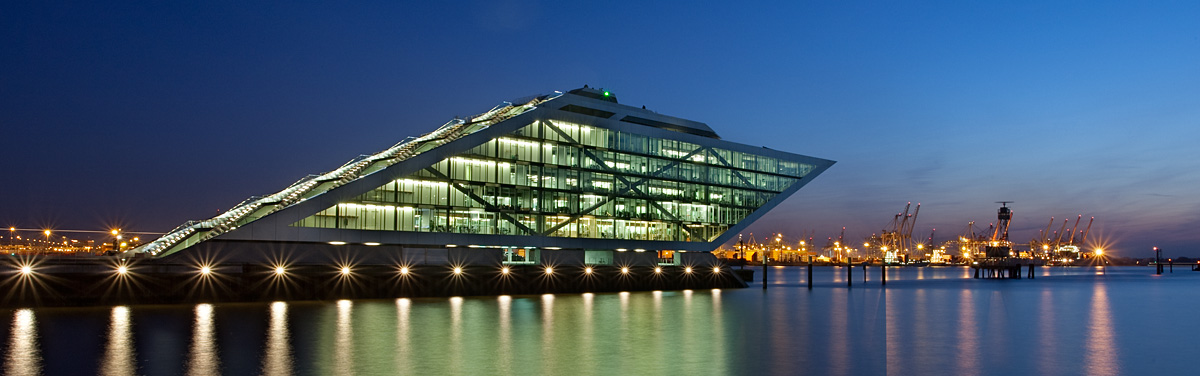 Das Bürogebäude "Dockland" im Hamburger Hafen